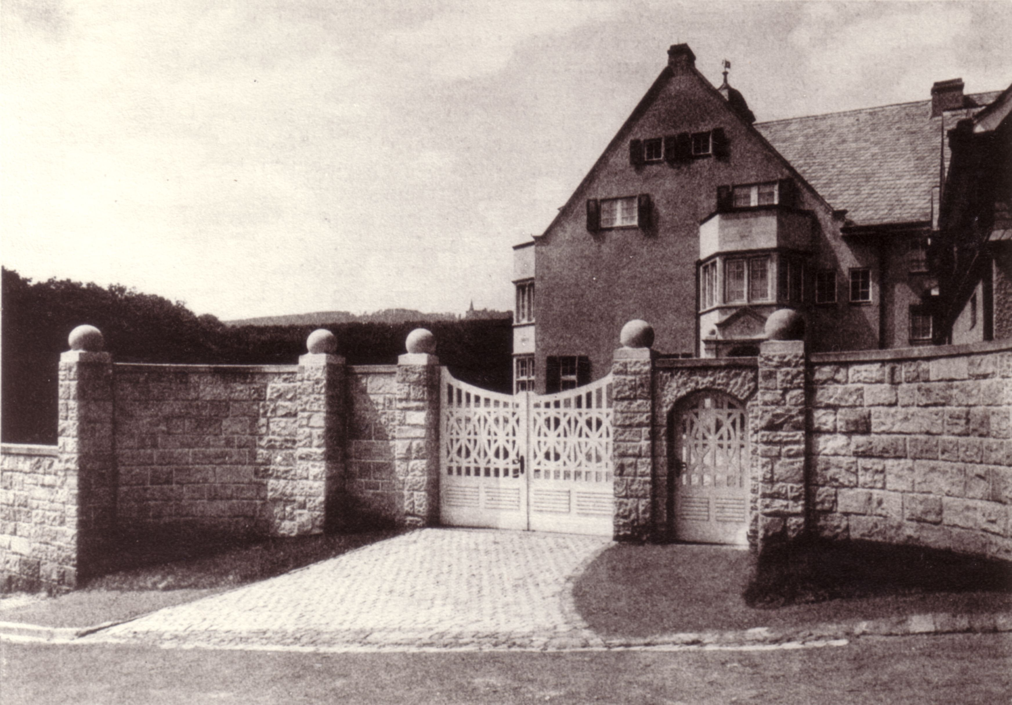 Ansicht der Villa Strombeck von vorne 1912